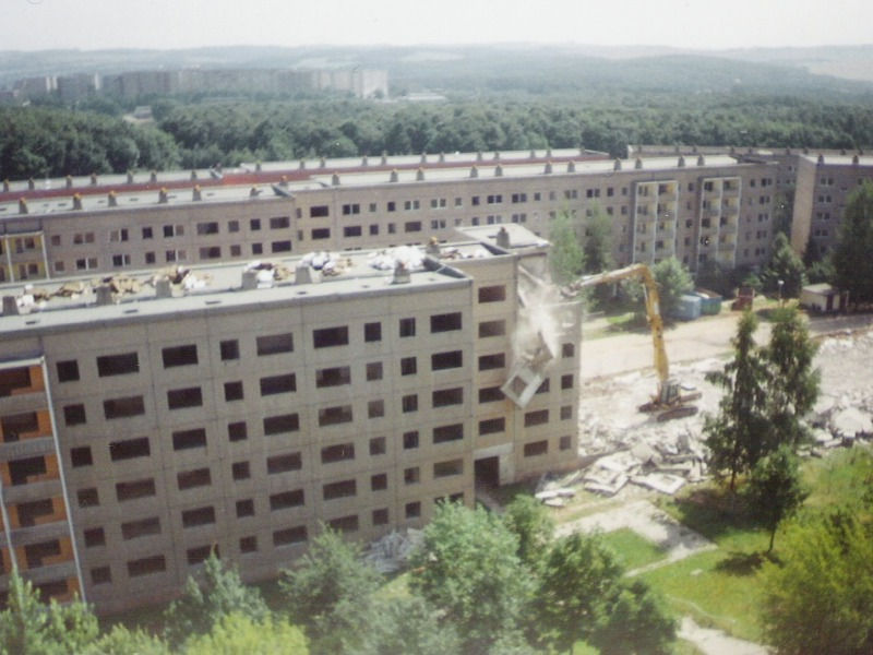 Abbruch der Plattenneubauten im Baugebiet VIII/1 an der Wolgograder Allee in Chemnitz im Jahr August 2001.